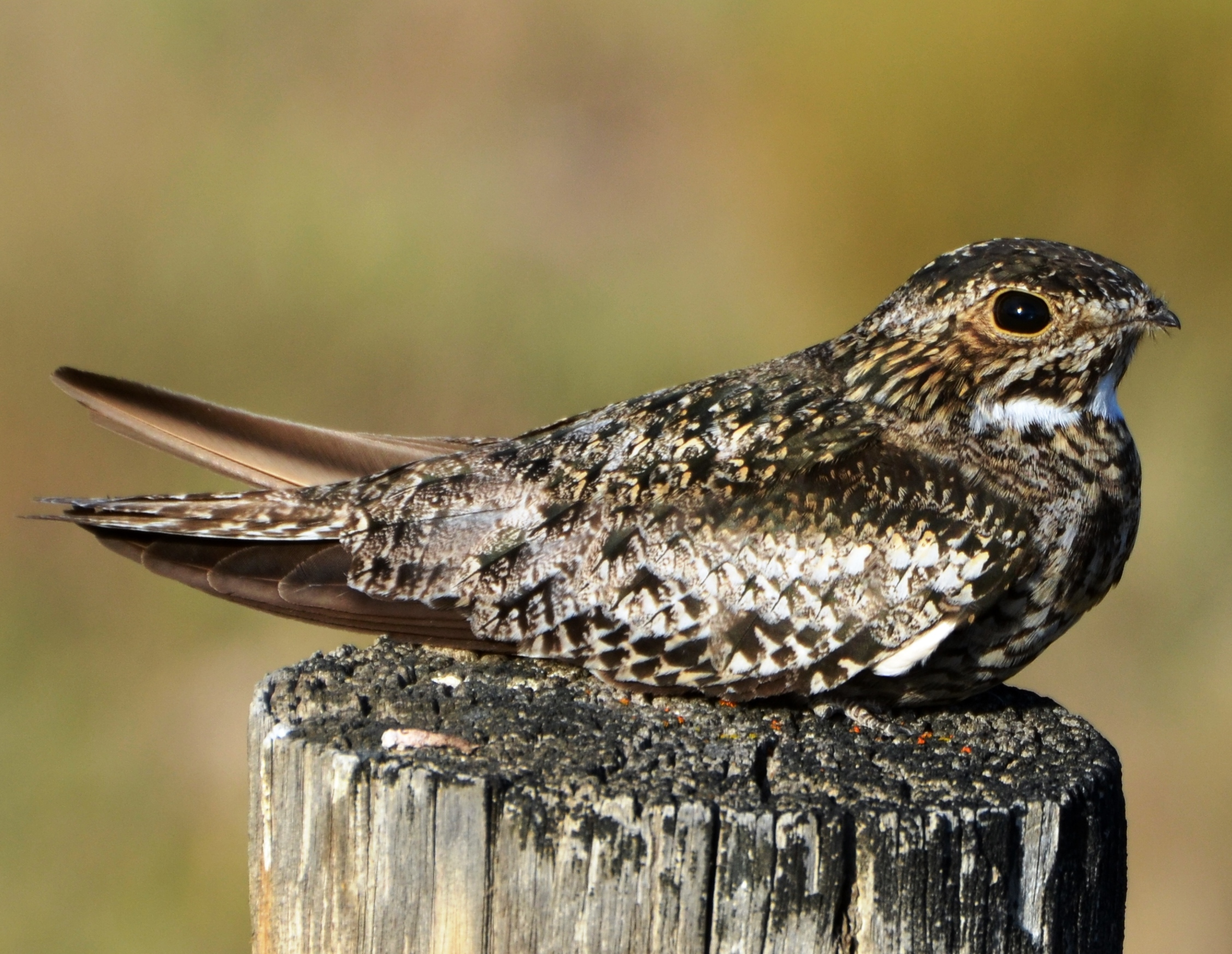 Oregon Trip 2014